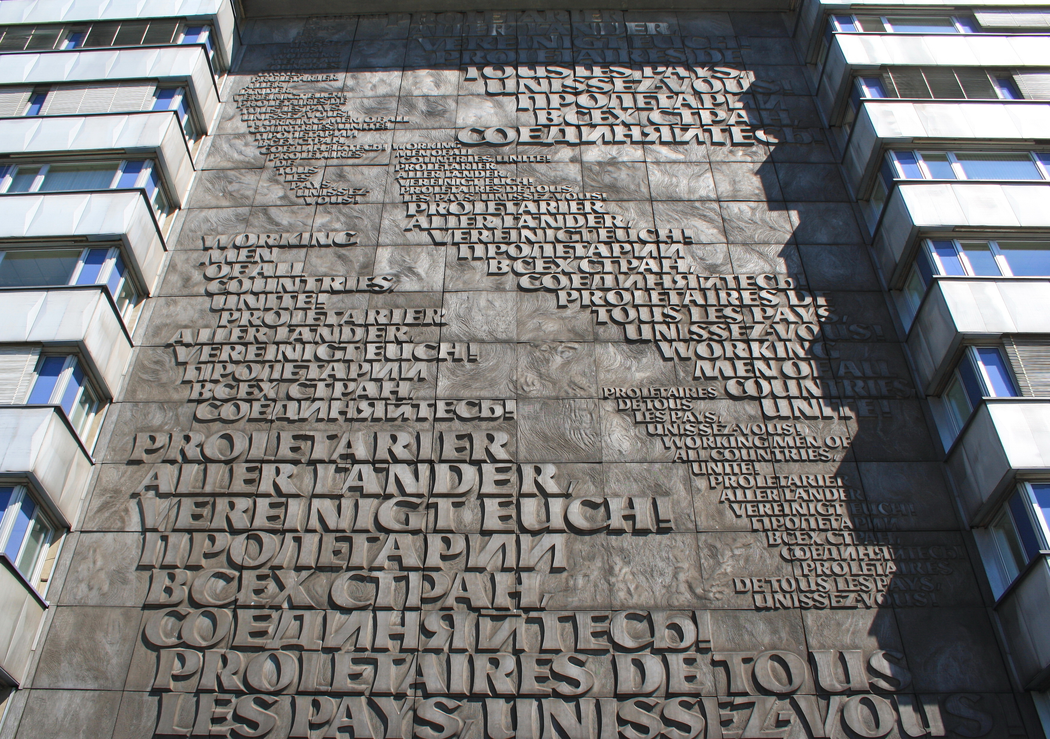 Proletаrier aller Länder, vereinigt euch! . Aufgenommen in Chemnitz.